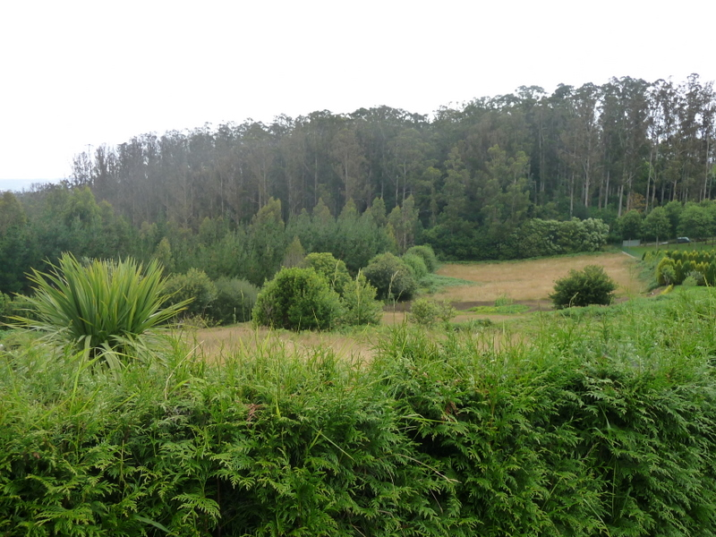 F